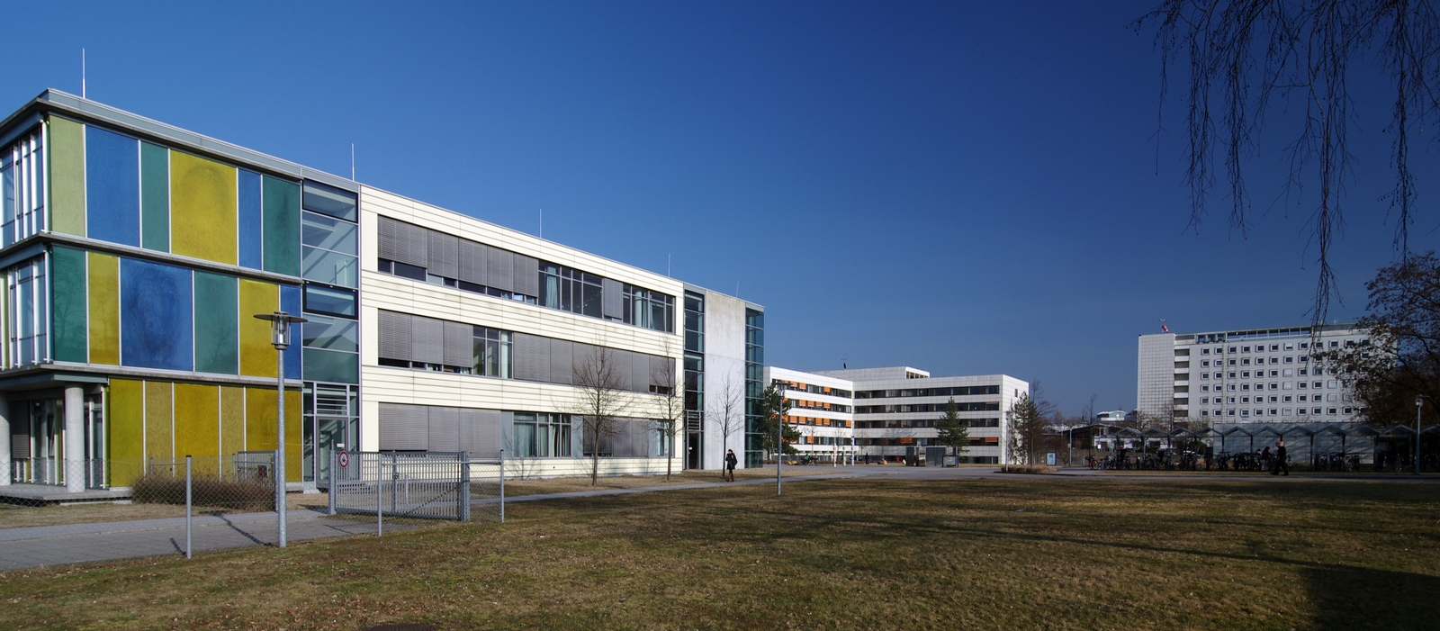 Neubauten des Städtischen Klinikums Karlsruhe